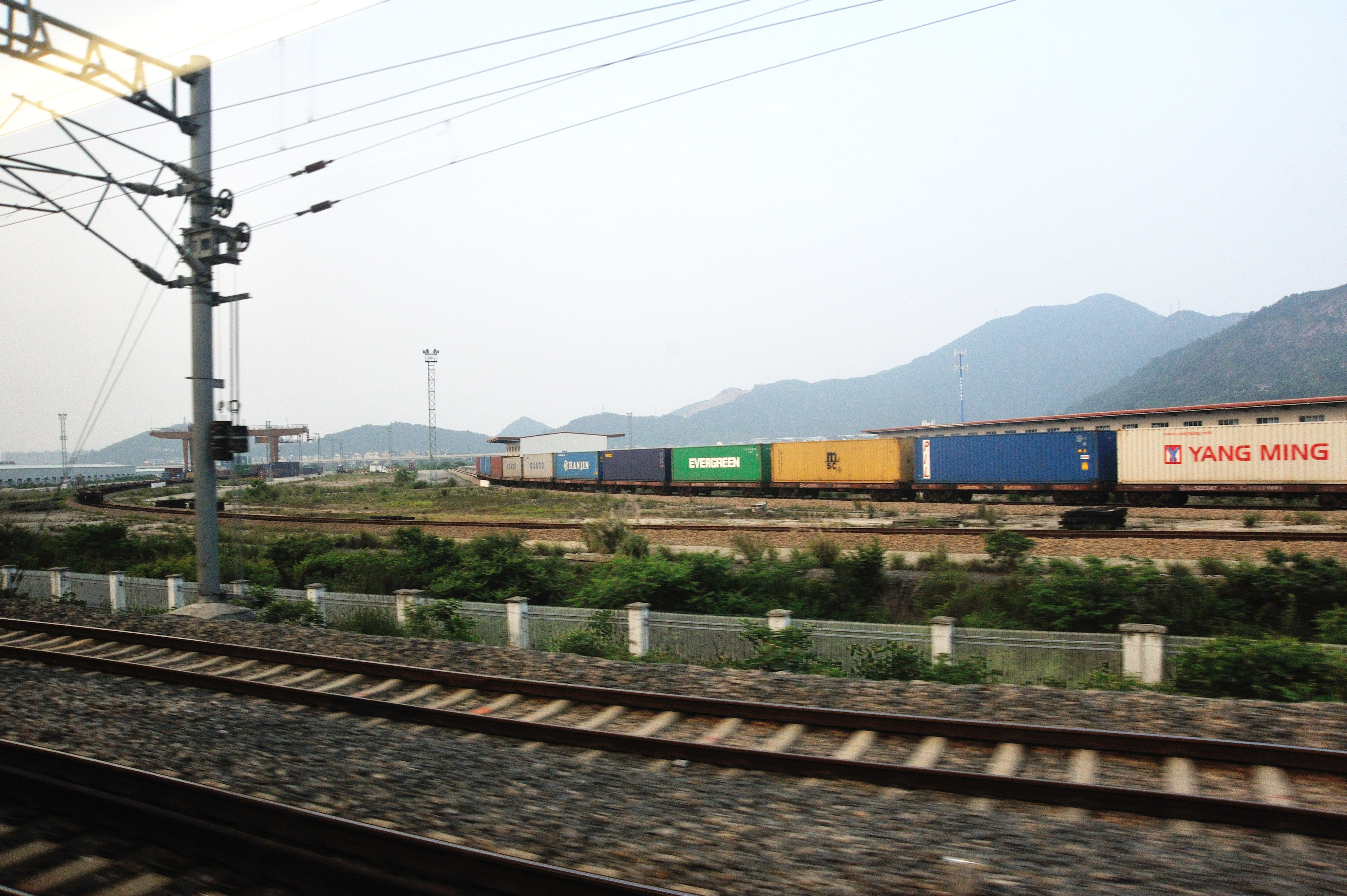 台州南站集装箱列车